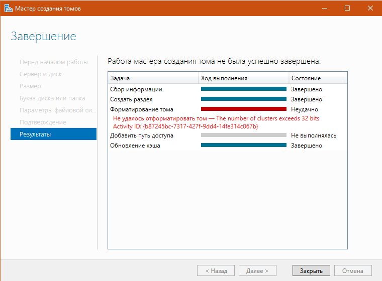 мастер создания тома вывел ошибку при попытке отформатировать том размером 652тб с кластером 64кб. О.с. Windows server 2016 standard edition 64bit